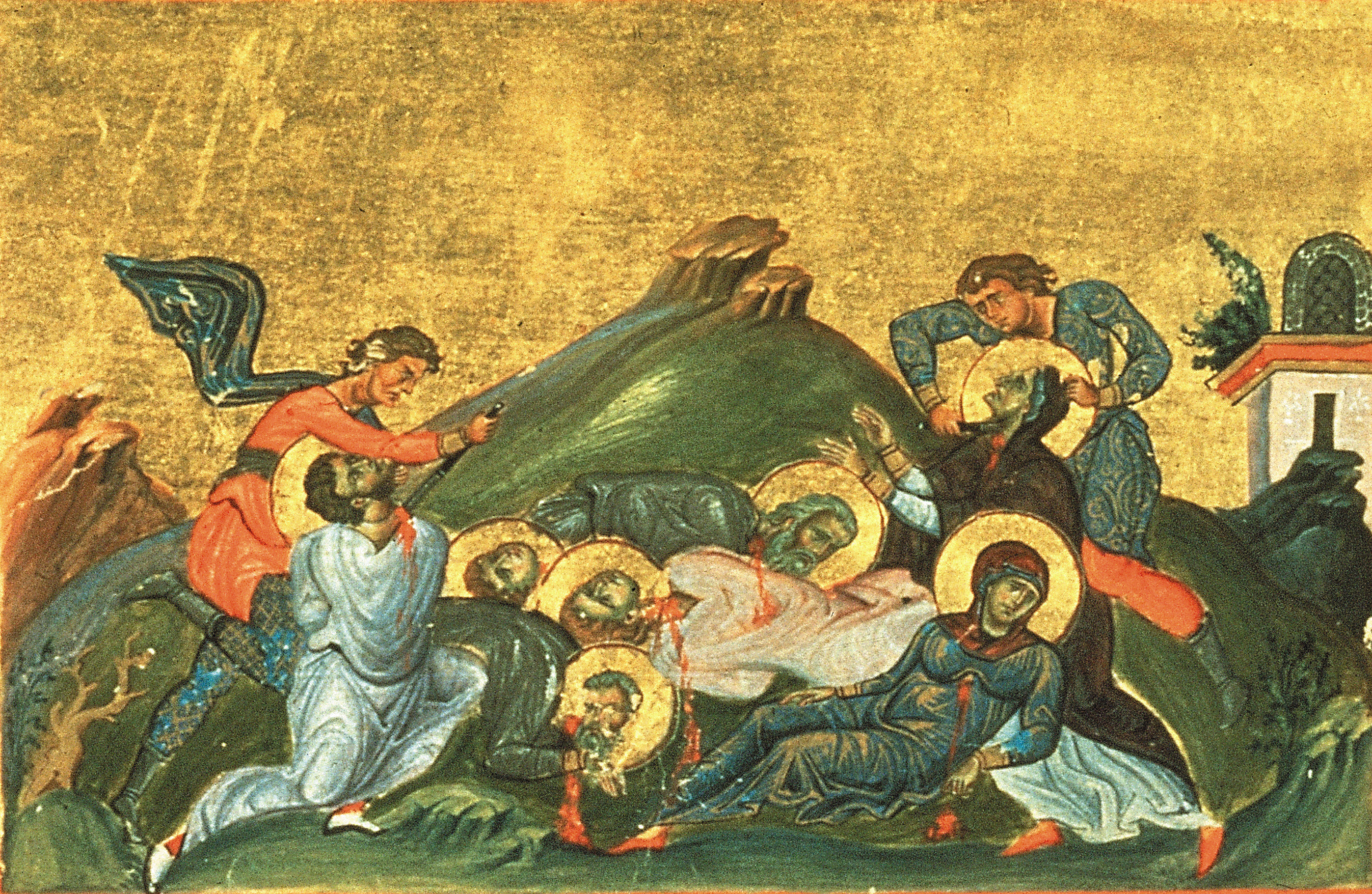 Мц. Перпетуя, мчч. Сатир, Ревокат, Саторнил, Секунд и мц. Филицитата Миниатюра Минология Василия II. Константинополь. 985 г. Ватиканская библиотека. Рим